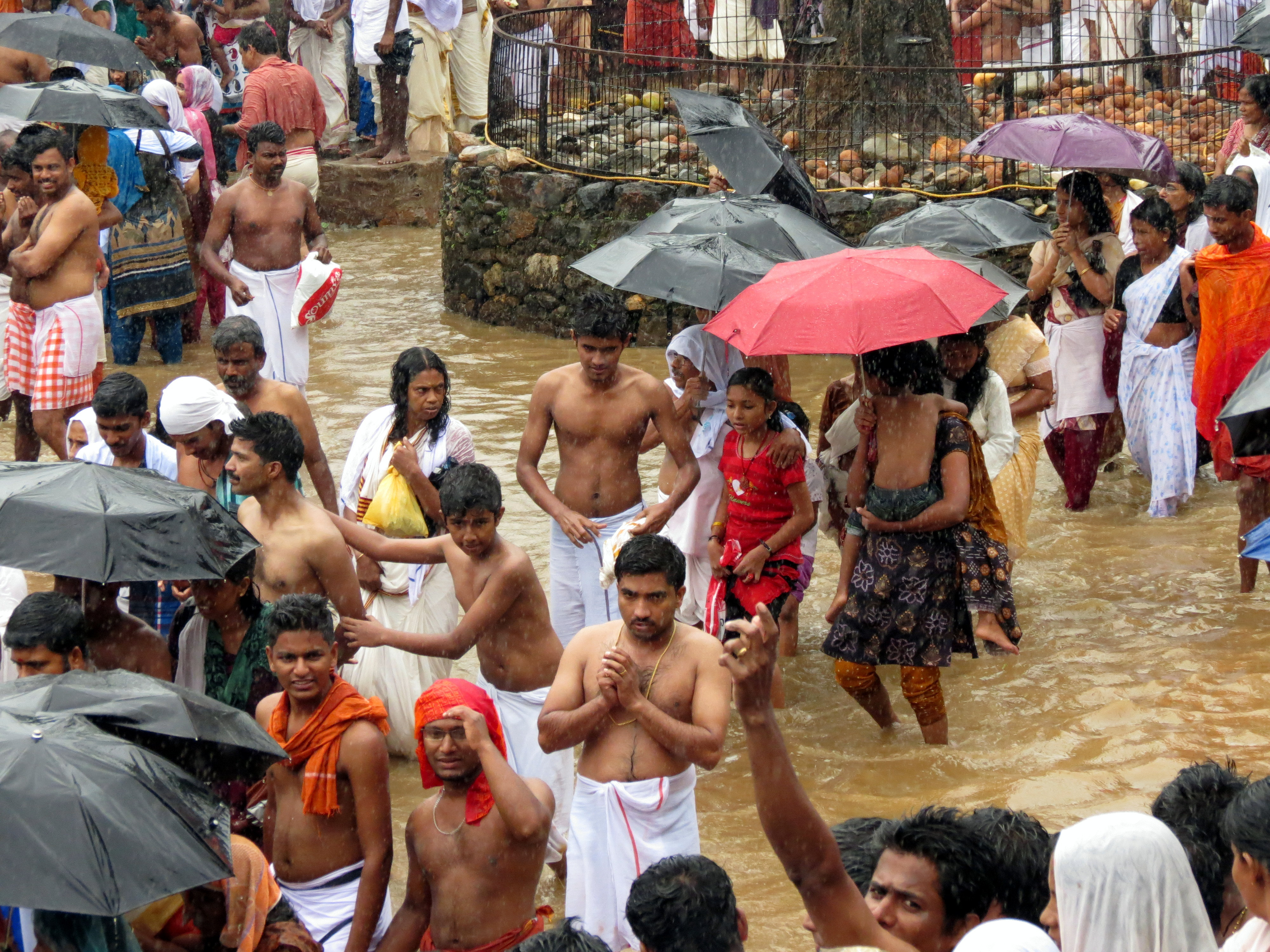 Vaisakha festival June 2013 at Kottiyoor temple, Kerala, India